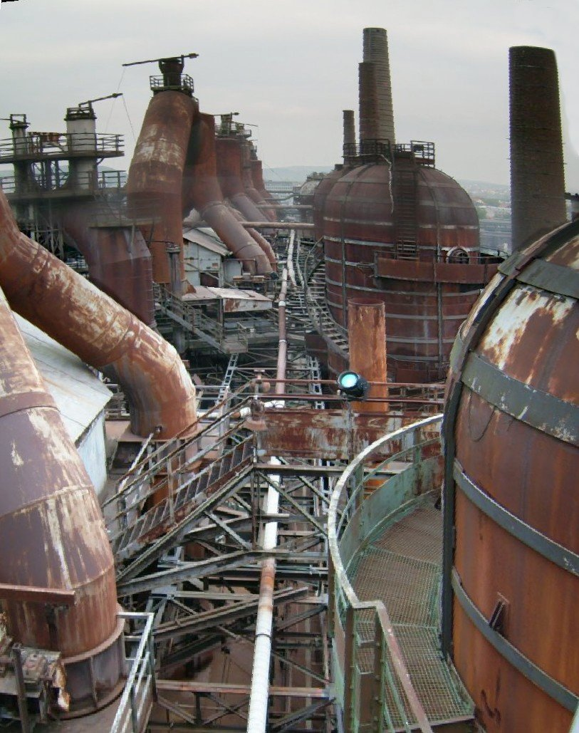 Hochöfen der Völklinger Hütte